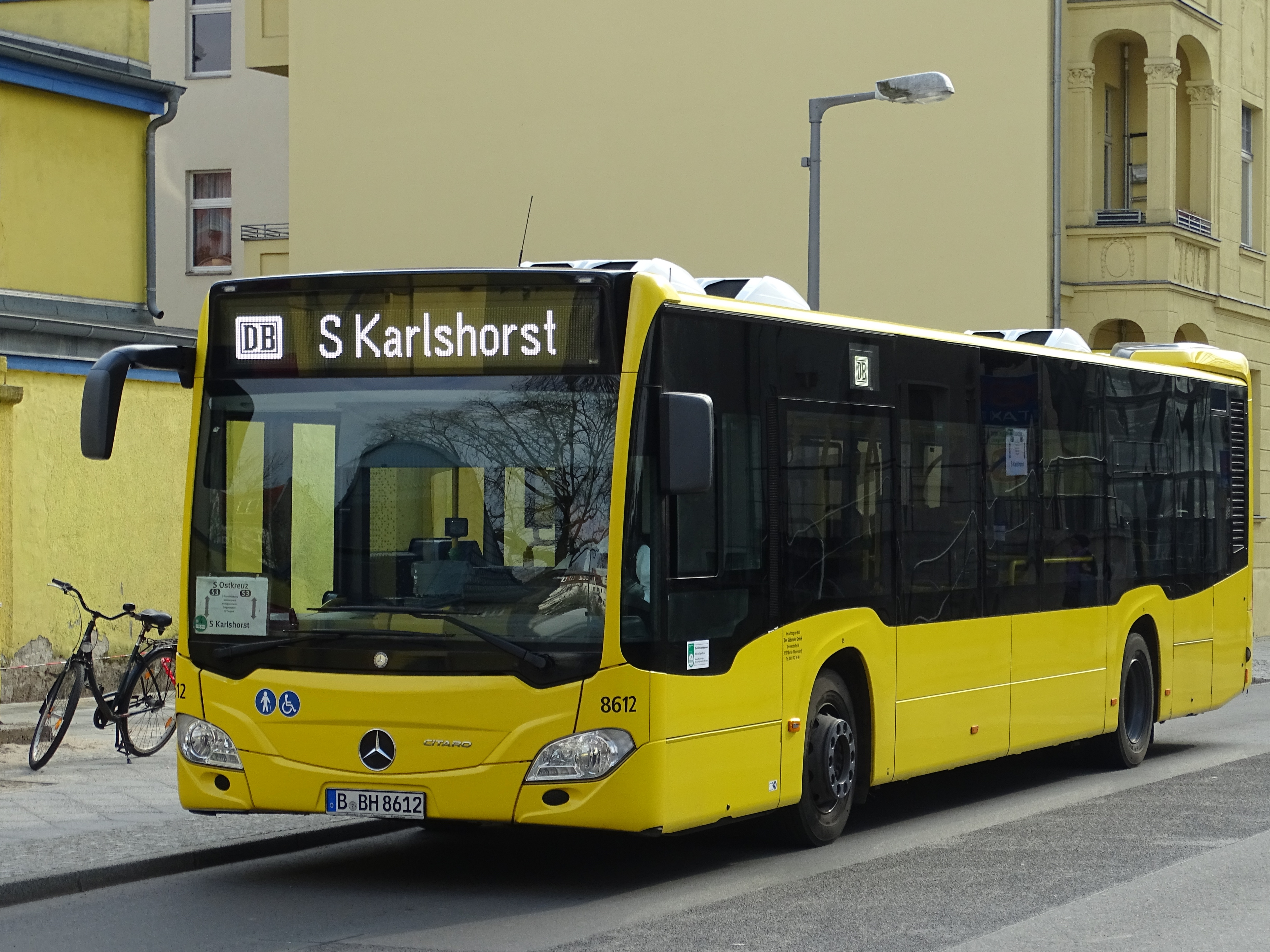 Evobus Mercedes-Benz Citaro2 der Firma Hartmann auf dem Schienenersatzverkehr für die SBahn Berlin in Berlin-Karlshorst